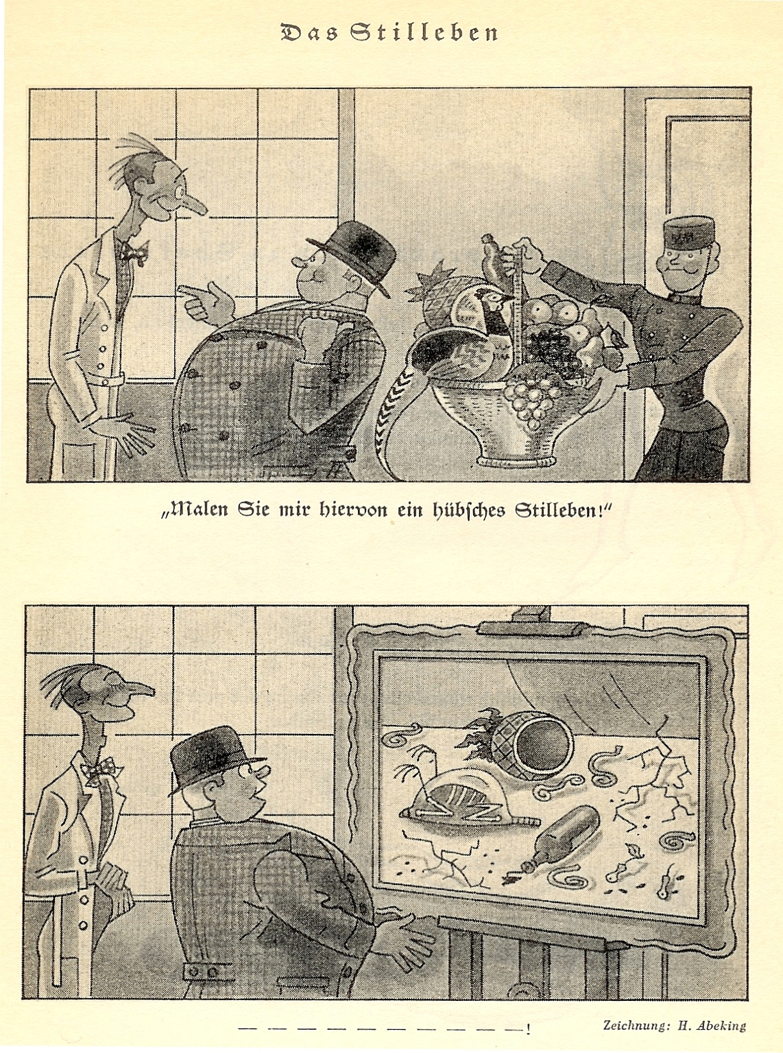 Hermann Abeking (1882-1939) - Das Stilleben